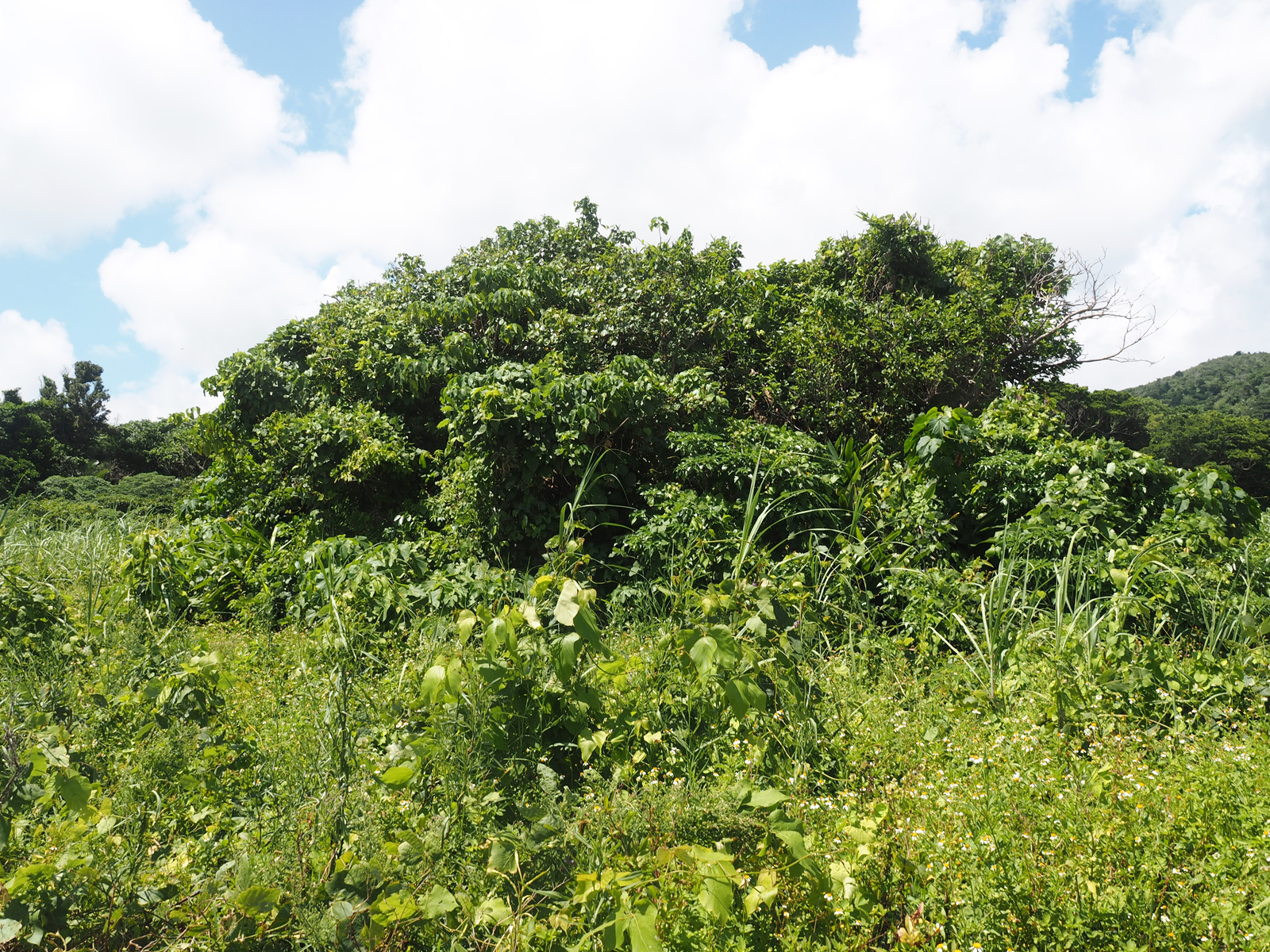 あまたりや潮荒（あまたりやすうあれ） 天然記念物「石垣島東海岸の津波石群」のひとつ（沖縄県石垣市石垣島）